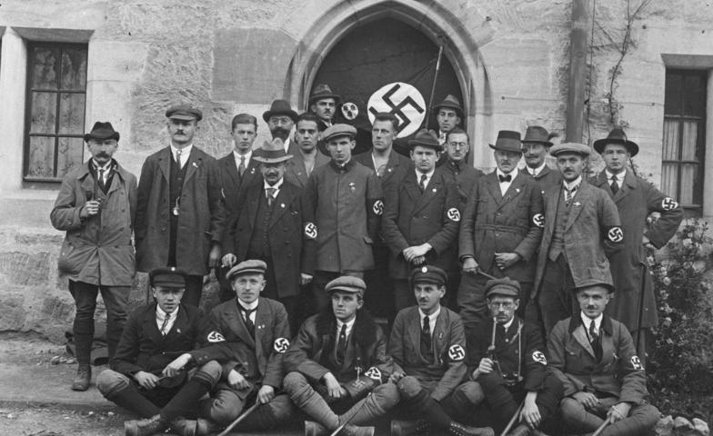 Coburg, "Deutscher Tag", NSDAP-Delegation "Deutscher Tag" in Coburg, links mit Pfeife und Hut Oskar Körner, Oktober 1922 [Coburg.- Großveranstaltung des Deutschvölkischen Schutz- und Trutzbundes am Wochenende des 14./15. Oktober 1922. Posieren der NSDAP-Delegation] Abgebildete Personen: Körner, Oskar: 2. Vorsitzender der NSDAP (links, stehend), gestorben 9.11.1923, Deutschland Christensen, Oluf: (rechts, stehend), gestorben 30.04.1957, Deutschland